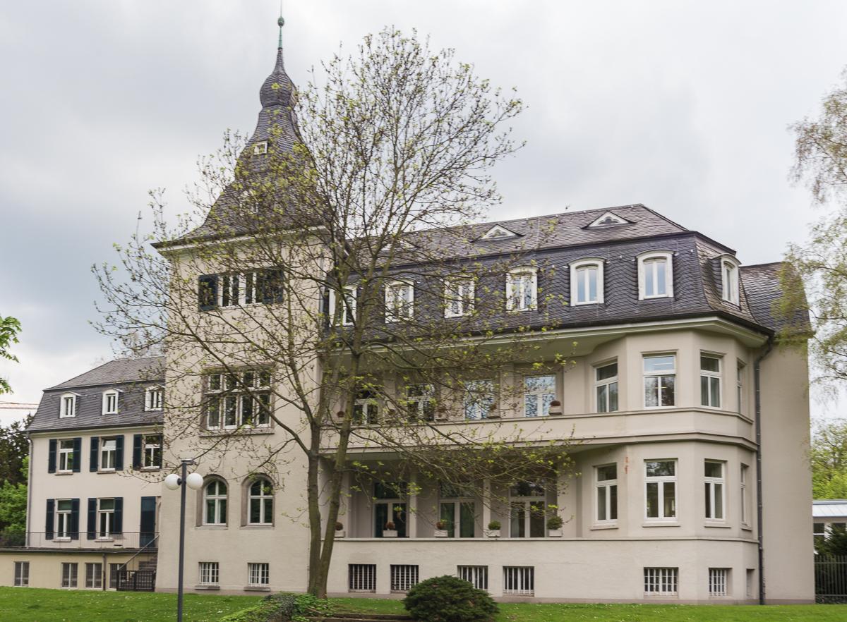 Schloss Deichmannsaue, Bonn, Deutschland